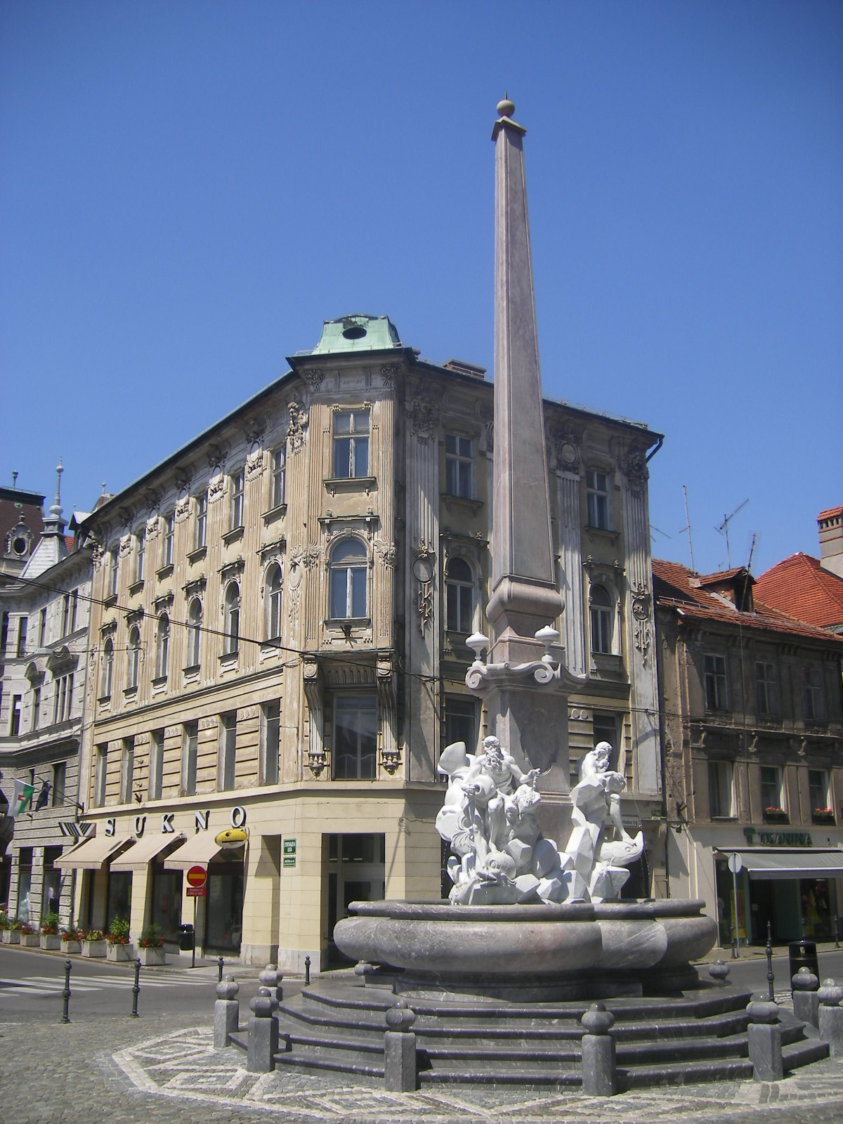 Ljubljana